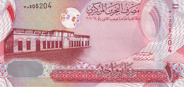 Бахрейн 1